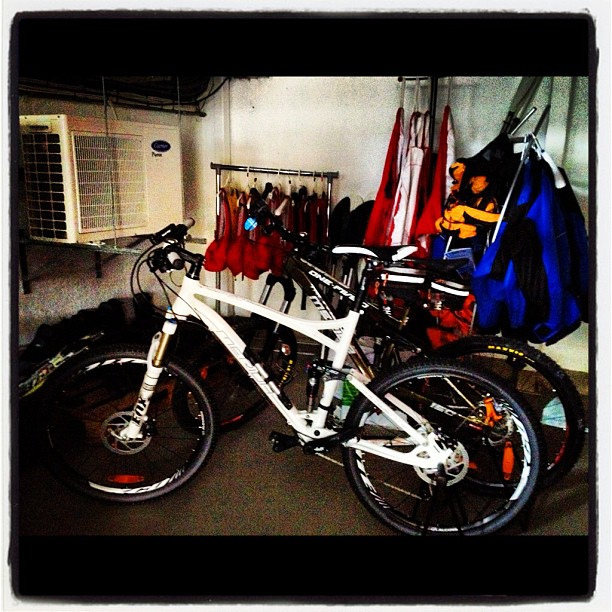 Hos Selje kommune kan ein leige aktivitetsutsyr.